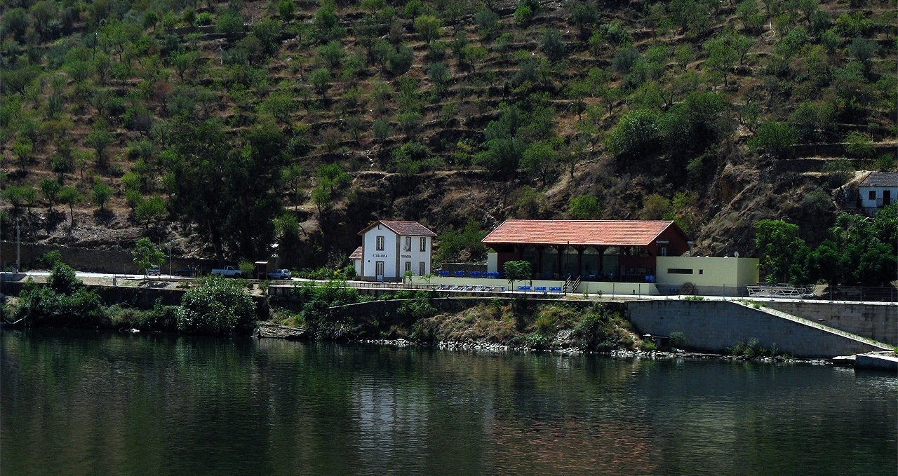 A estação de Ferradosa encontra-se desligada da linha do Douro que passa agora na margem contrária. Actualmente é um café. E actualmente Ferradosa possuí um apeadeiro mais à frente.